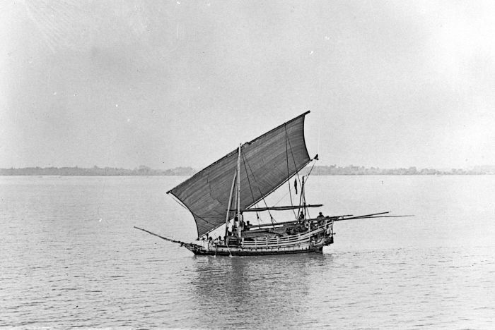 Repronegatief. De overgrote meerderheid van de Indonesische vaartuigen was aan het einde van de koloniale periode (en nog steeds) van hout. Kleine vaartuigen werden op een groot aantal plaatsen gebouwd, voor de wat grotere had men gespecialiseerde werven nodig. De belangrijkste bouwers van inheemse scheepstypes van enige omvang, waren de Makassaren en Boeginezen. Dat geldt in feite nog steeds. Hun schepen trof men in de hele Archipel aan. Daarnaast waren (en zijn) Boeginezen en Makassaren ook belangrijk als reders en als handelaren, overigens twee functies die niet noodzakelijkerwijs samengaan. (P. Boomgaard, 2001). Inheemse prauw te Makassar